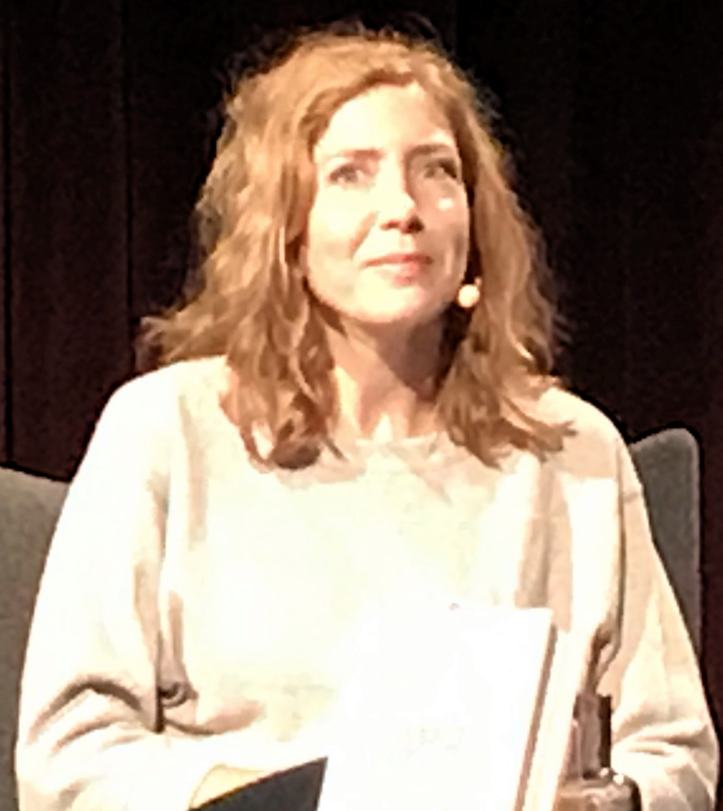 Amanda Svensson, på Bokmässan i Göteborg 2019.